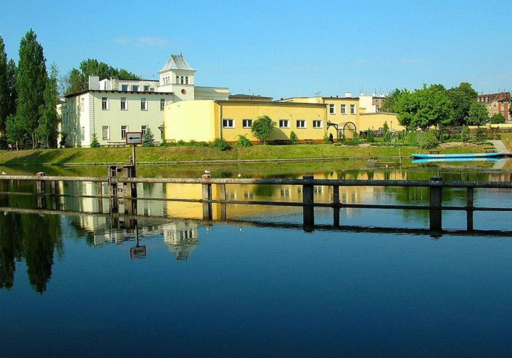 Dawna garbarnia Buchholza, obecnie campus Wyższej Szkoły Gospodarki w Bydgoszczy